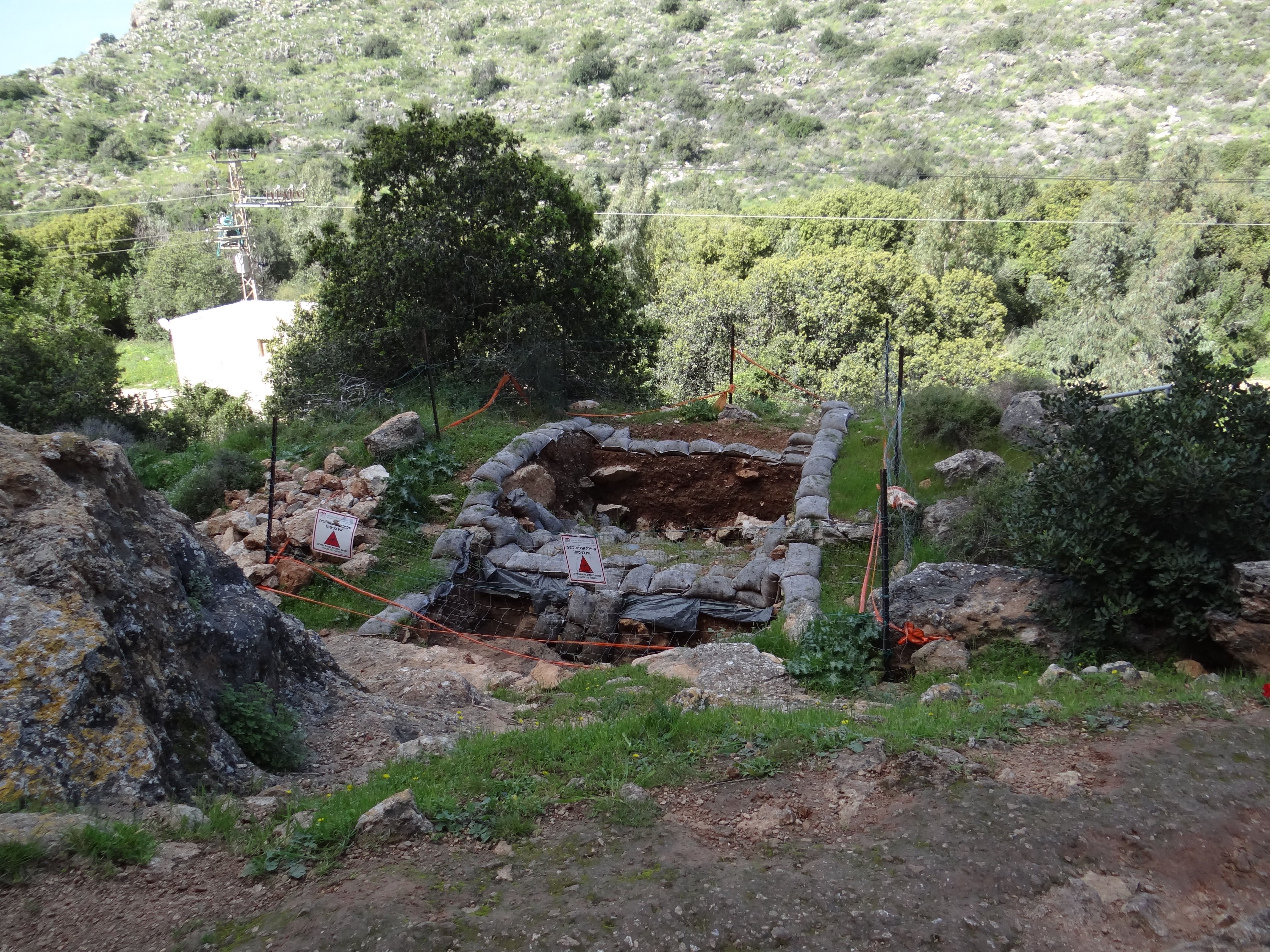 מערת הגדי היא אתר ארכאולוגי-פרהיסטורי מן התרבות המוסטרית של התקופה הפלאוליתית התיכונה במערב הכרמל. האתר, הכולל מערה קטנה וטרסה טבעית בפתחה, בתמונה חפירה ארכאולוגית בטרסת המערה